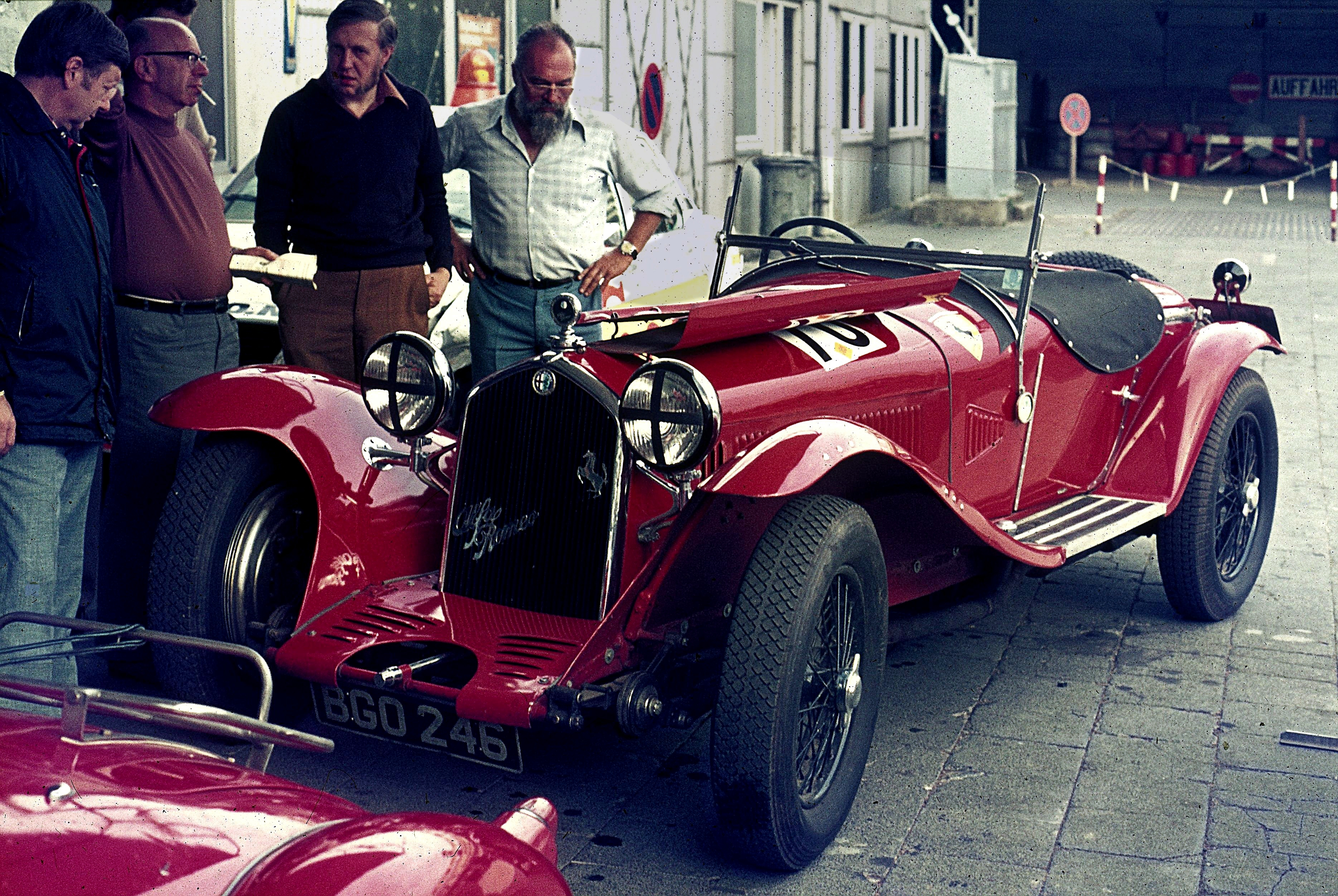 Alfa Romeo 8C 2300, Baujahr 1932